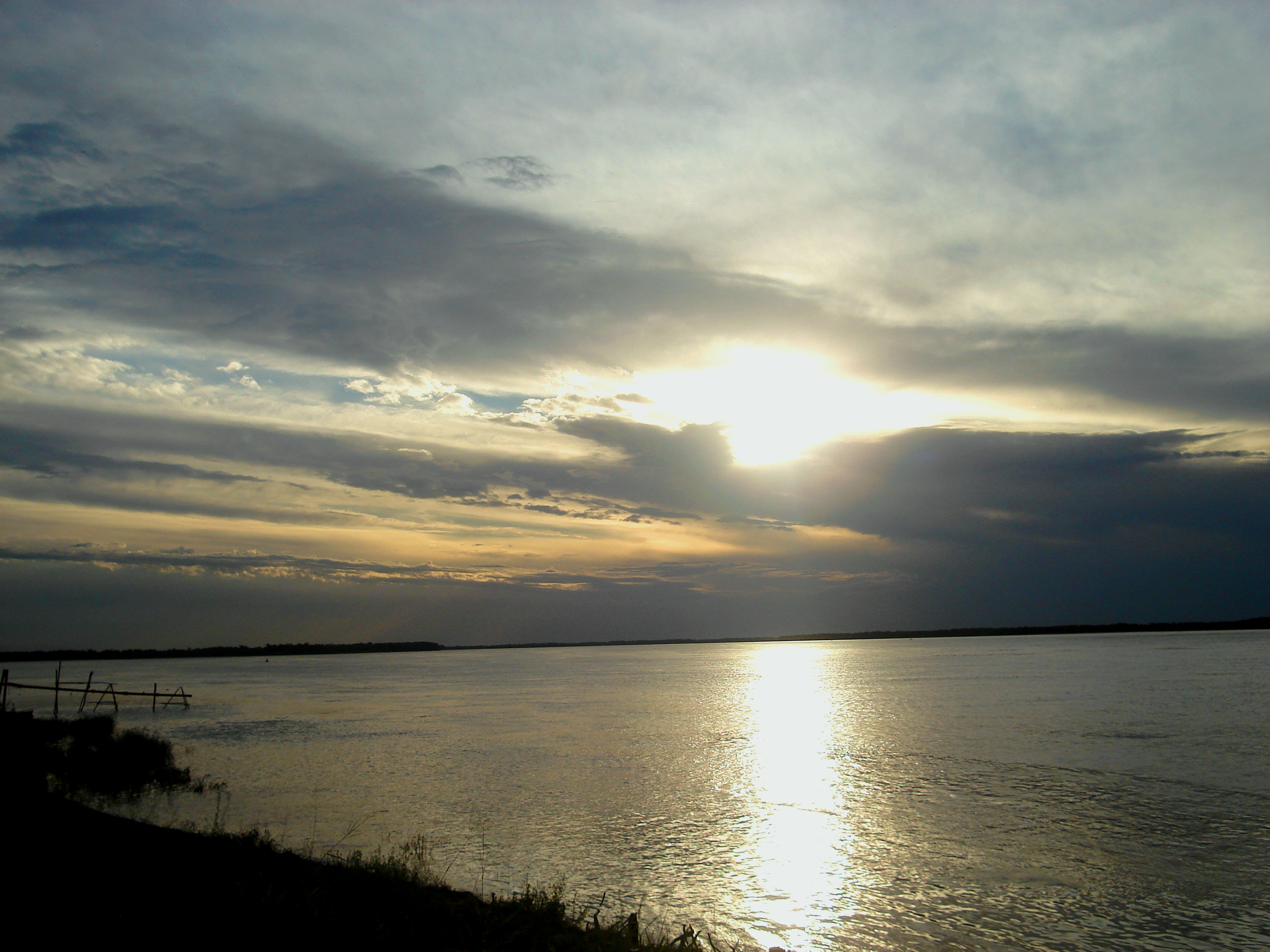 Río Paraná